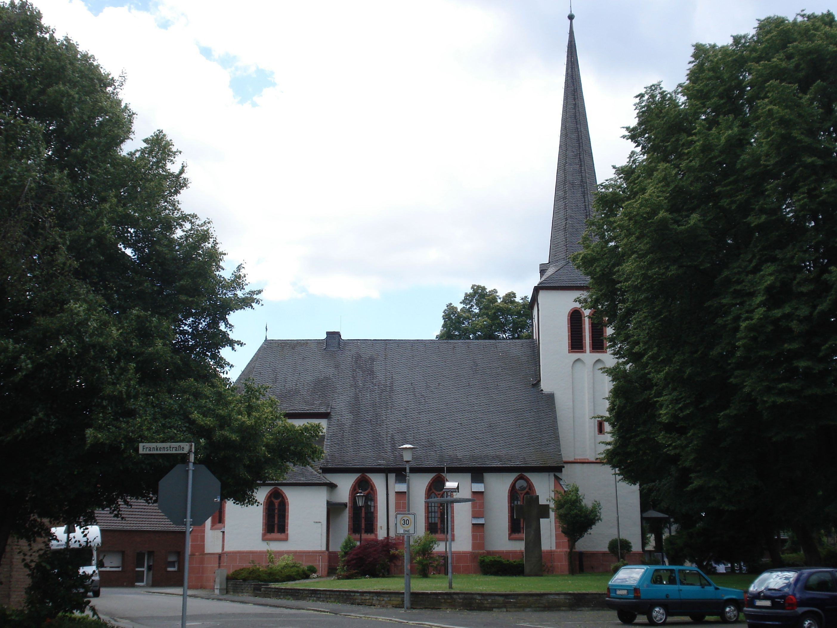 Kirche St.Lucia Elsdorf-Angelsdorf This is a photograph of an architectural monument.